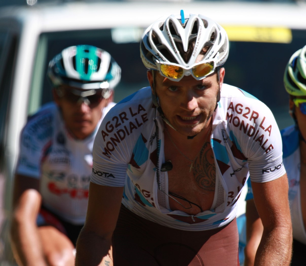 5577 nocentini